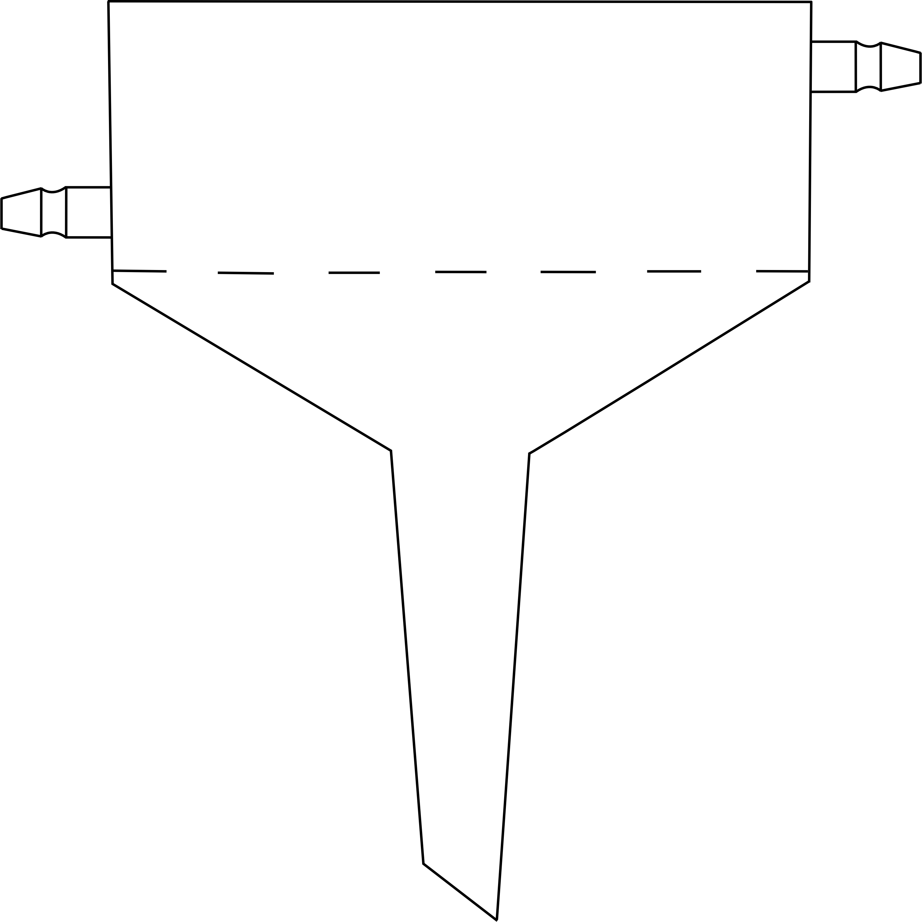 Dampfnutsche